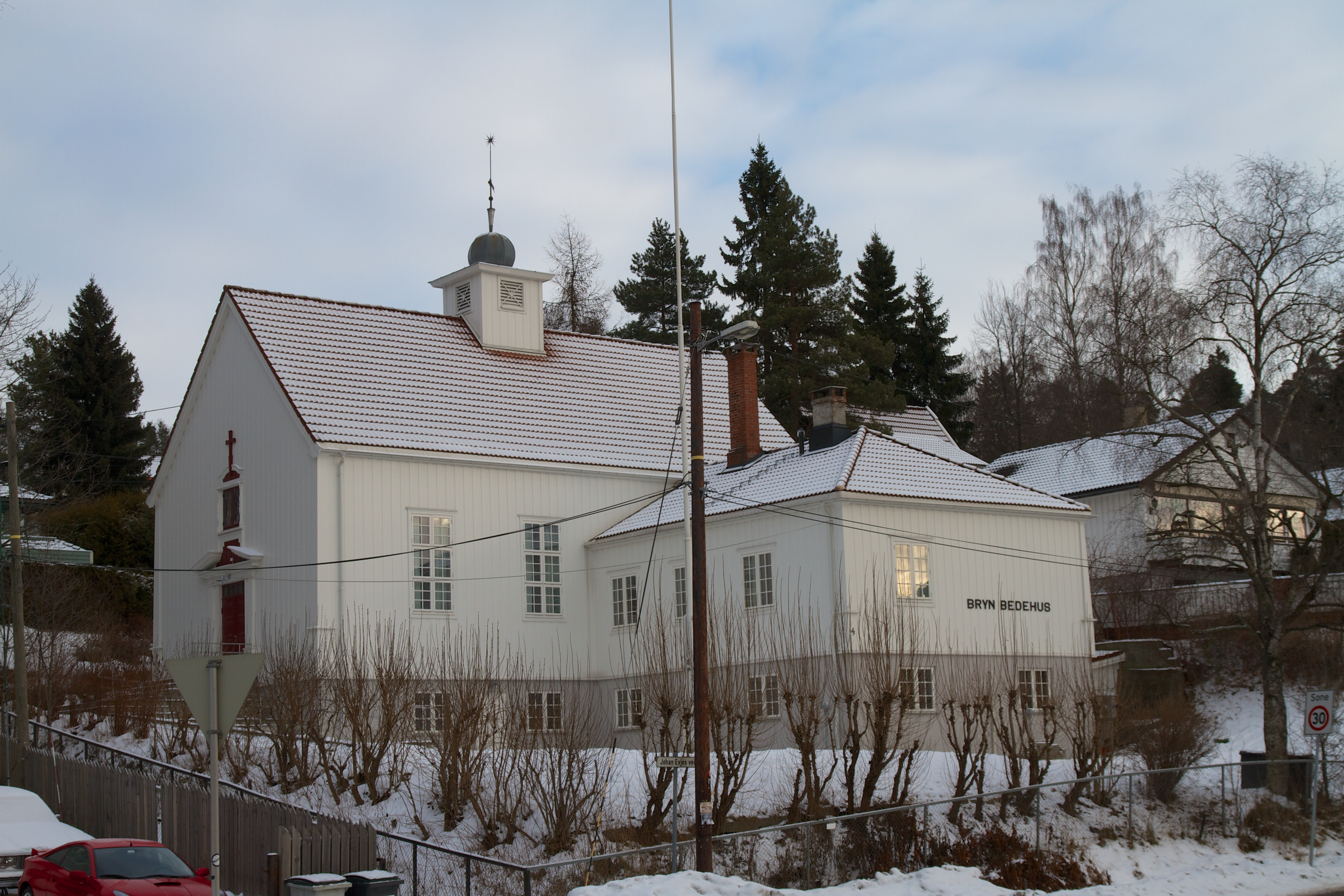 Bryn bedehus, der Den Læstadianske forsamling i Oslo holder til.